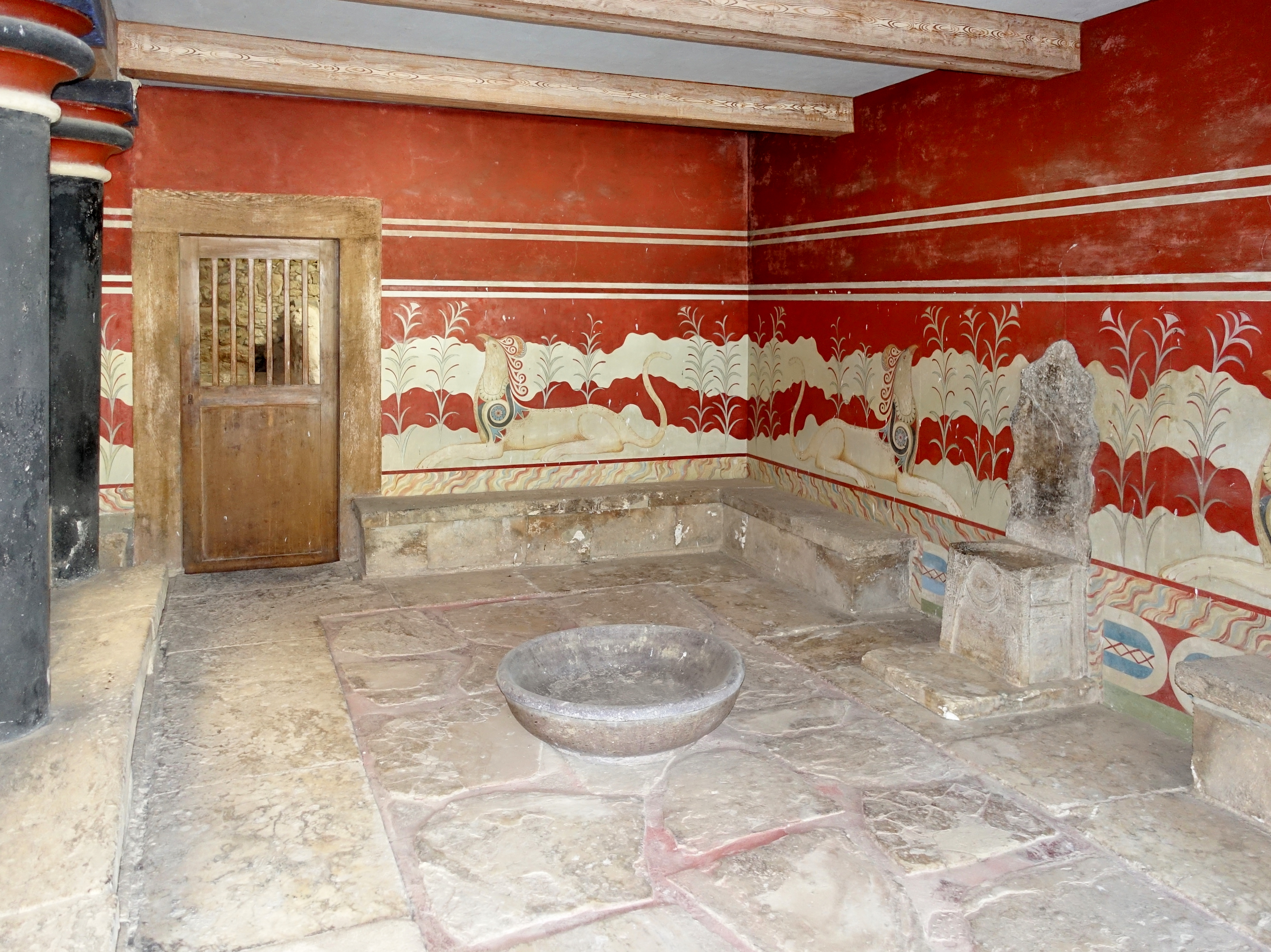 Am 13. April 1900 bei Ausgrabungen entdeckter „Thronsaal“ von Knossos (Κνωσός) südlich von Iraklio, Kreta, Griechenland